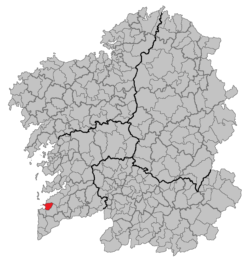 Mapa coa localización do concello de Nigrán.